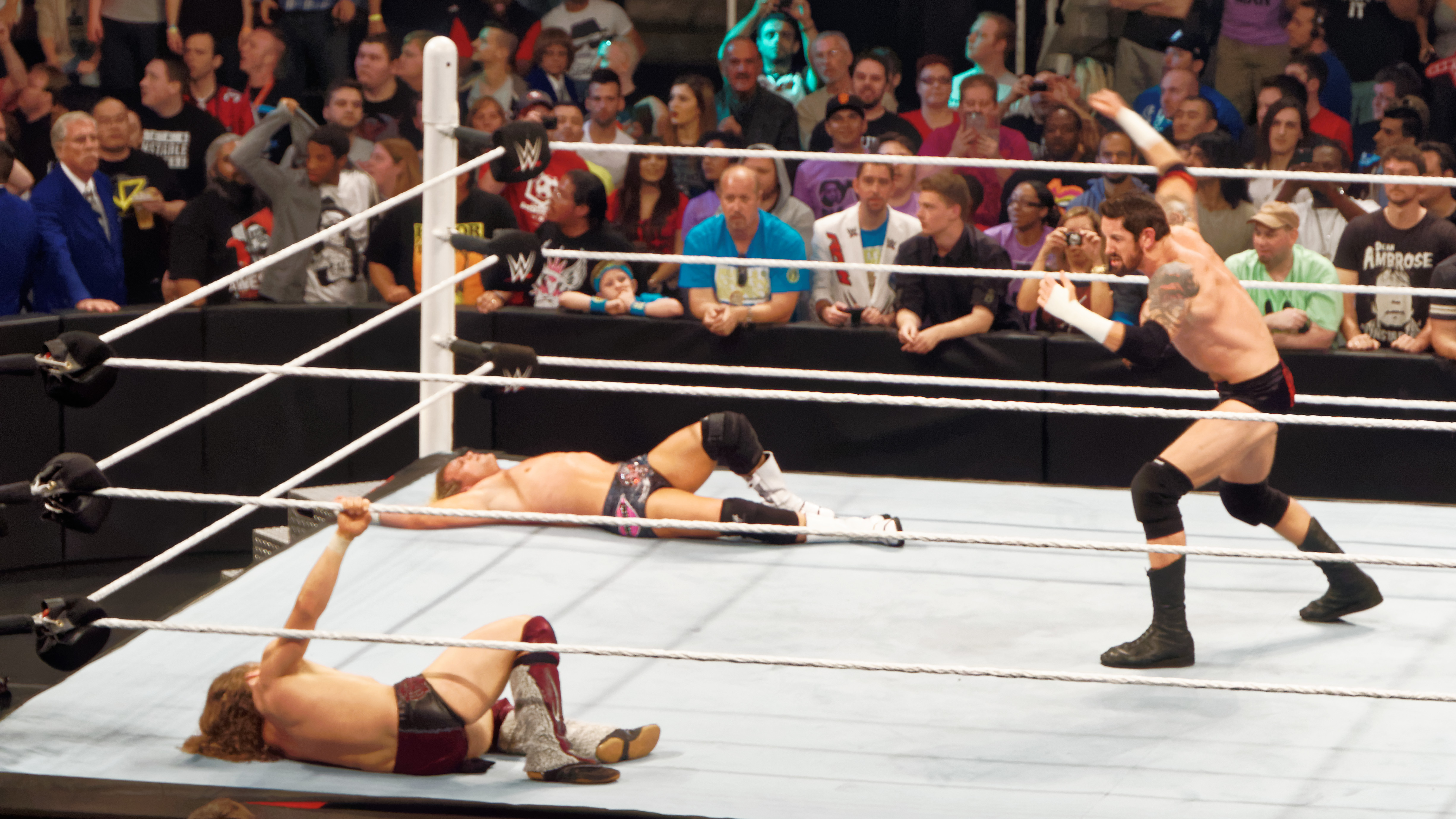 2015-03-30_17-31-22_ILCE-6000_0821_DxO